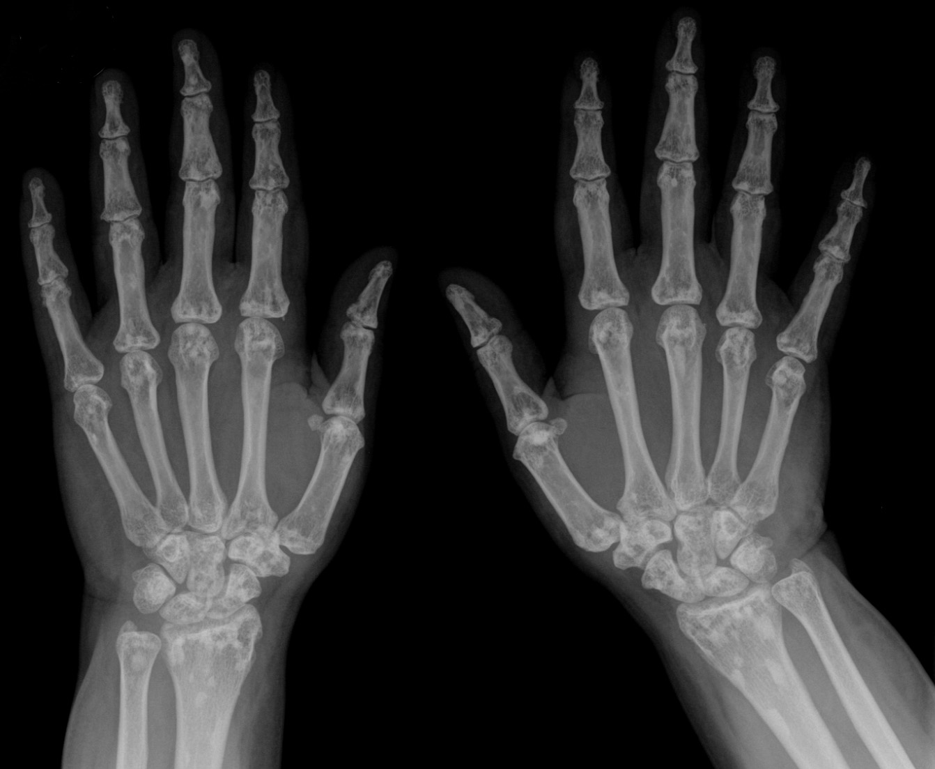 Osteopoikilóza skeletu ruky